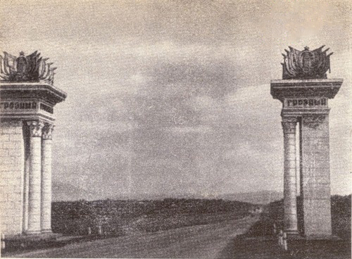 Везъд в Грозный Арх. Я. Берковиц